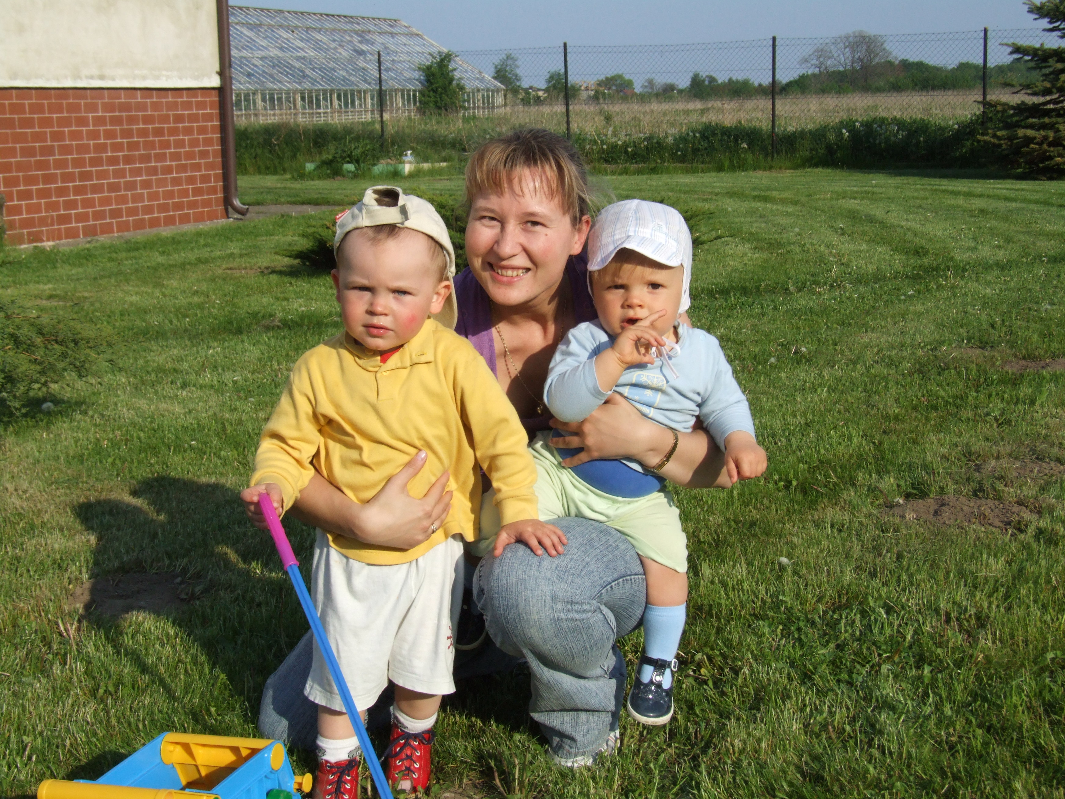 Aga z Szymonem i Krystianem